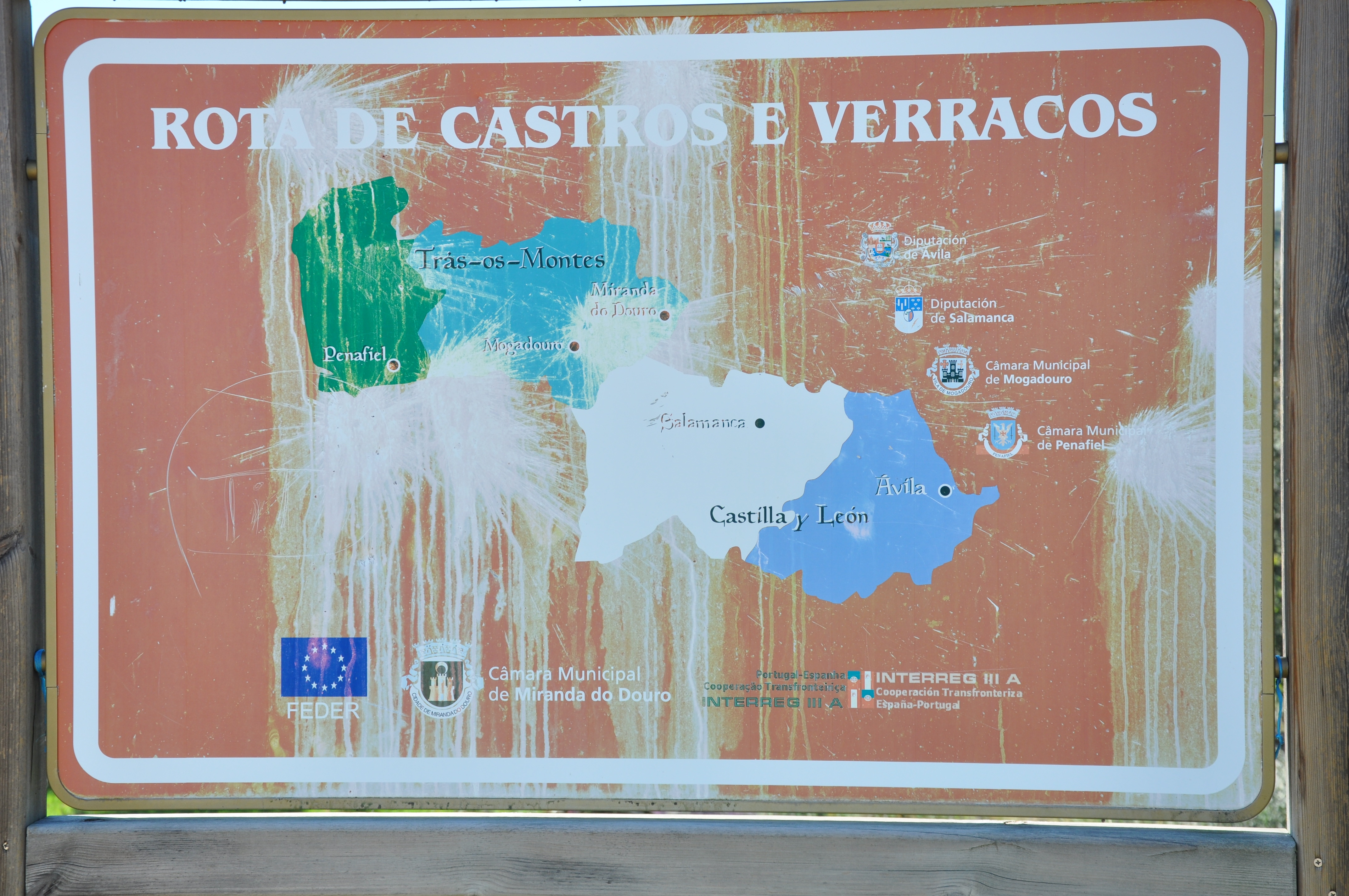 Cartel, Miranda de l Douro. Portugal.